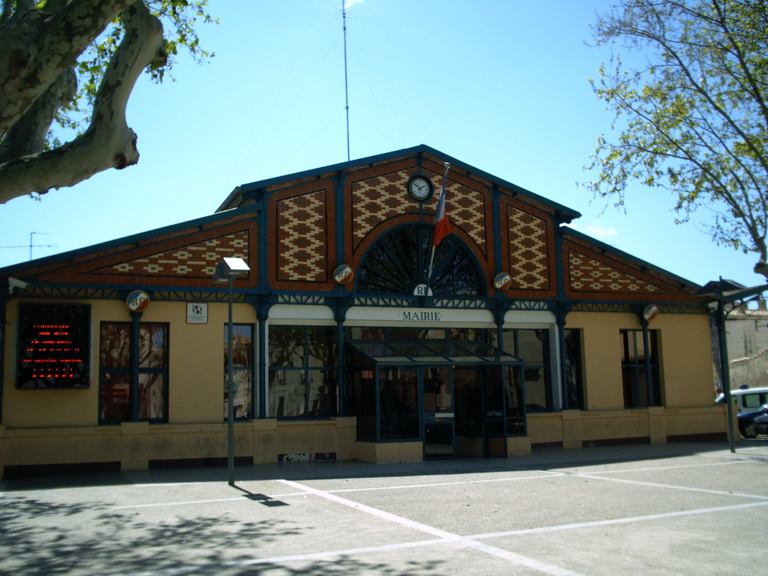 Mairie de Lansargues (Hérault)